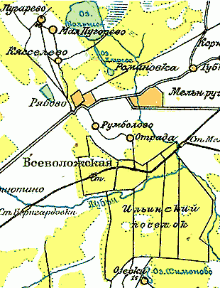 Фрагмент карты окрестностей Ленинграда 1928 г., включающий Ильинский посёлок.